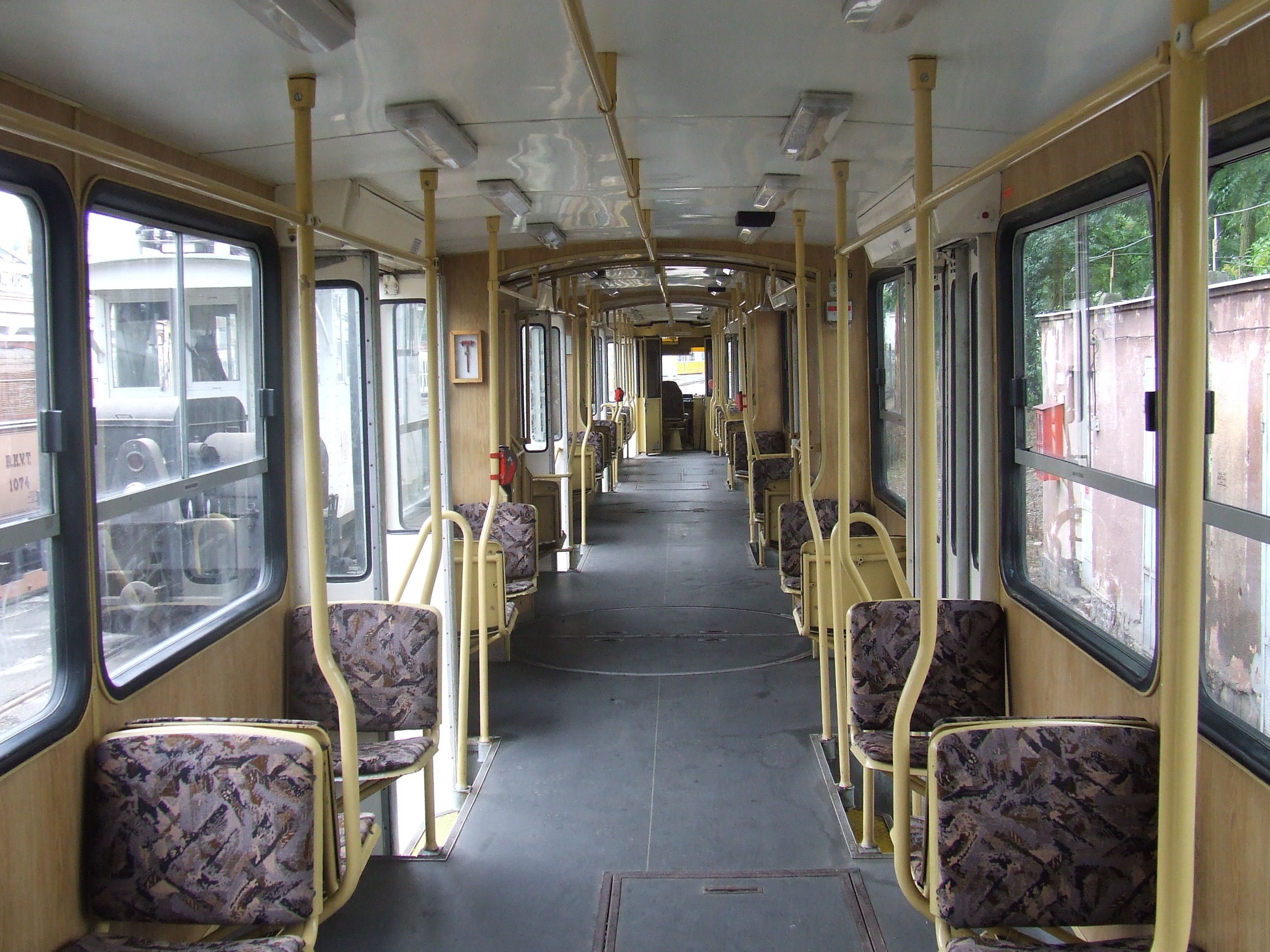 Ipari csuklós villamos, utastér